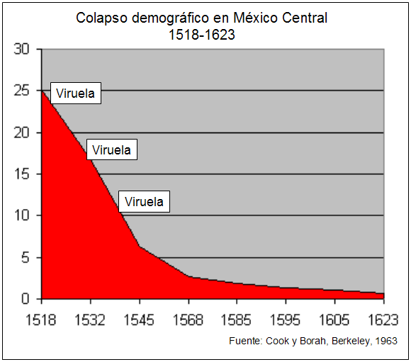 Gráfico. Colapso demográfico en México Central (1518-1623). El eje vertical señala la población en millones de personas.